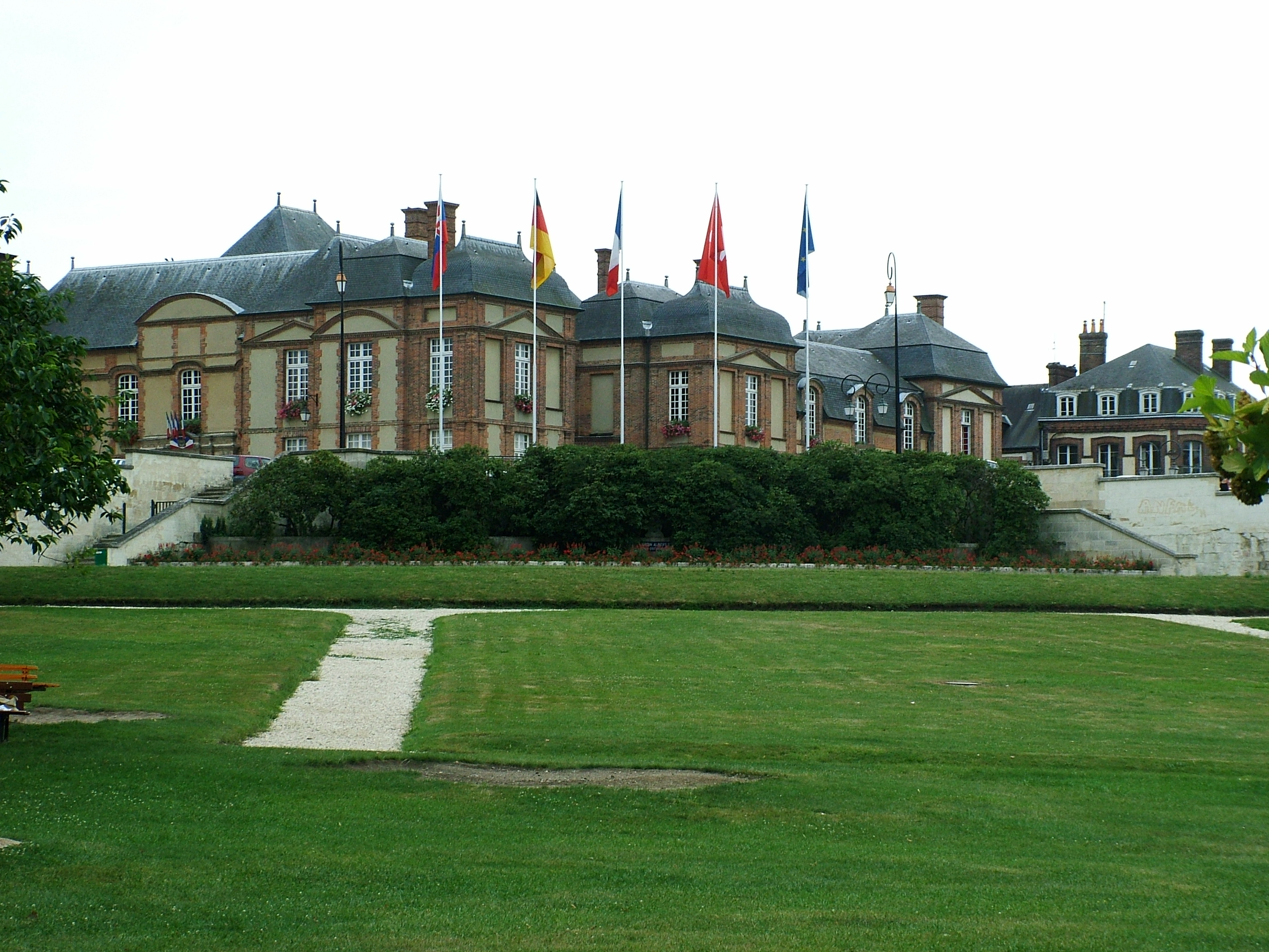 Une vue du château